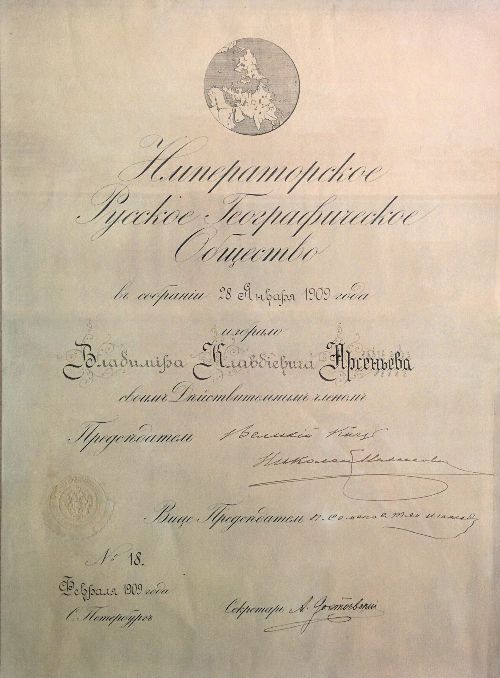 Диплом Действительного члена Императорского Русского Географического общества, выданный Владимиру Клавдиевичу Арсеньеву, с подписями председателя Императорского Русского Географического общества (ИРГО) Великого князя Николая Михайловича и заместителя председателя ИРГО Петра Петровича Семёнова-Тян-Шанского.